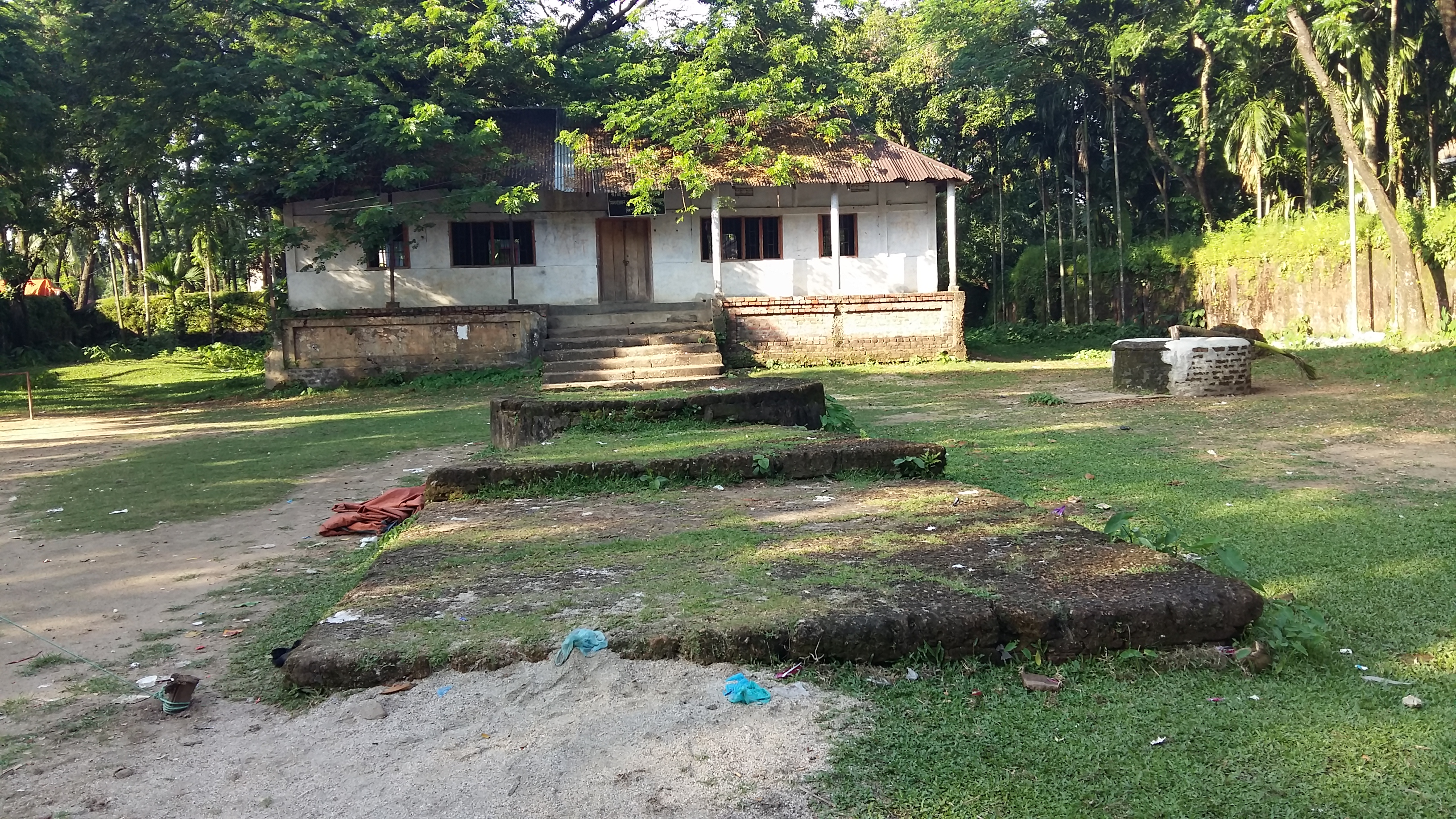 জয়েন্তশ্বরী বাড়ি